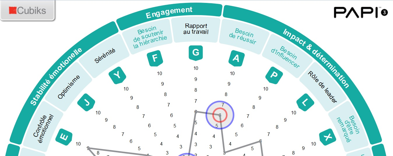 Extrait d'une Rosace PAPI 3. Provient d'un Rapport Dynamique de l'entreprise Cubiks (ayant droit).